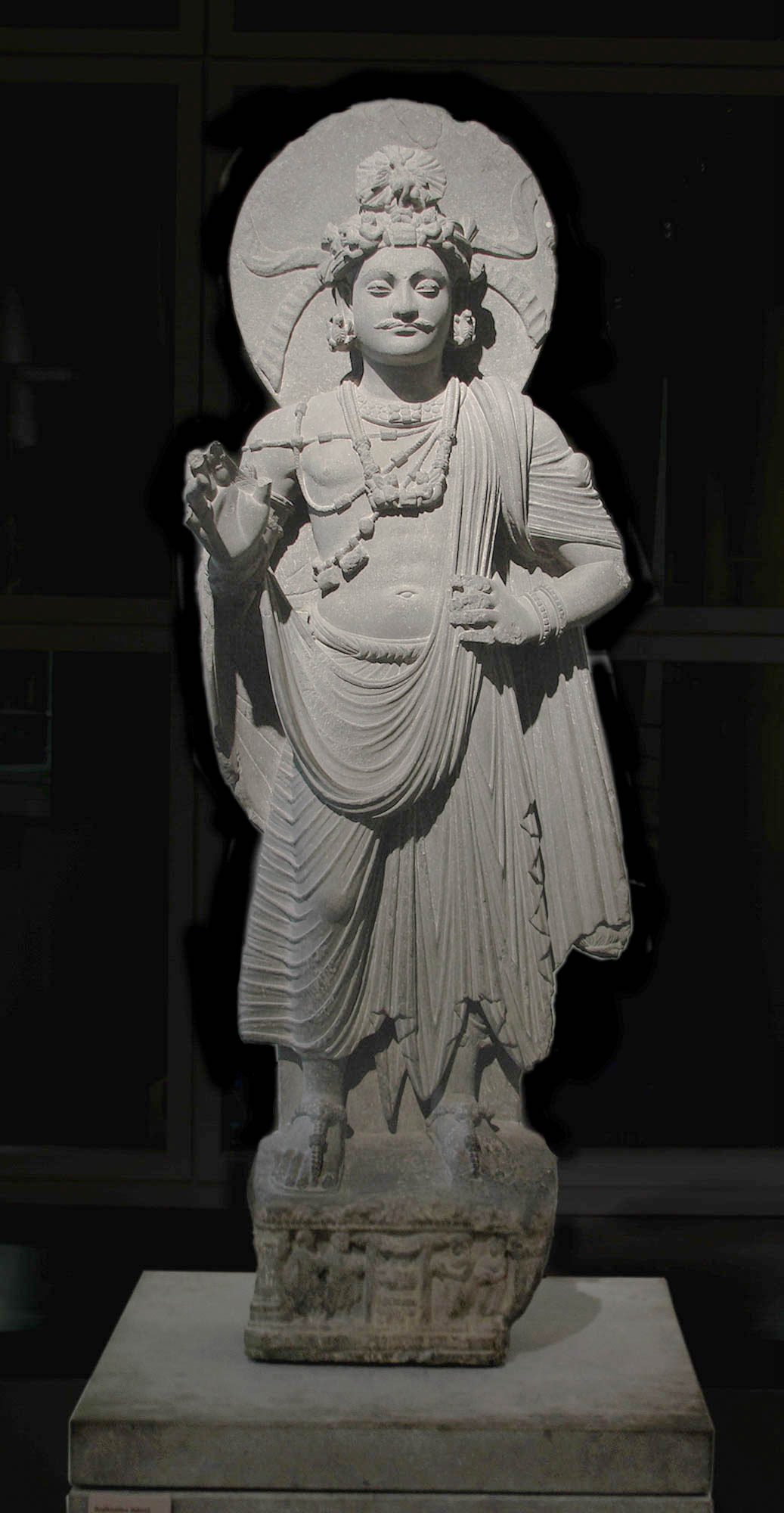 Bodhisattva debout, monastère de Shahbaz-Garhi, art du Gandhara, 1er-3ème siècle, schiste, Hauteur : 120 cm. Mission Foucher. Musée Guimet, Paris. Représenté debout faisant le geste d’absence de crainte, ce bodhisattva montre toutes les caractéristiques de l’art du Gandhâra communément désigné par « art gréco-bouddhique » ; les sculpteurs gandhâriens s’inspirent du canon hellénistique pour ces premières figurations bouddhiques : ainsi en est-il du drapé mouillé de la traditionnelle dhotî dont il est vêtu. Son torse nu est recouvert de bijoux ; sa parure mêle les influences indiennes, scythes, gréco-romaines et iraniennes. L’ urnâ au-dessus du nez ainsi que les doigts de la main droite retenus par une membrane palmée, révèlent sa nature supra-humaine, conformément aux textes canoniques du bouddhisme. Le socle est également orné d’une scène bouddhique, illustrant l’adoration du bol à aumône de l’Eveillé par les donateurs. Cette pièce représente peut-être le futur Buddha, avant sa renonciation au monde alors qu’il est encore le prince Siddhârtha Gautama, mais peut-être aussi le bodhisattva Avalokiteshvara. Cette sculpture en schiste gris bleuté est exécutée en très haut relief. Elle provient du monastère de Mekhasanda situé dans le mont Mahâban qui domine le site de Sâbâz-garhî.